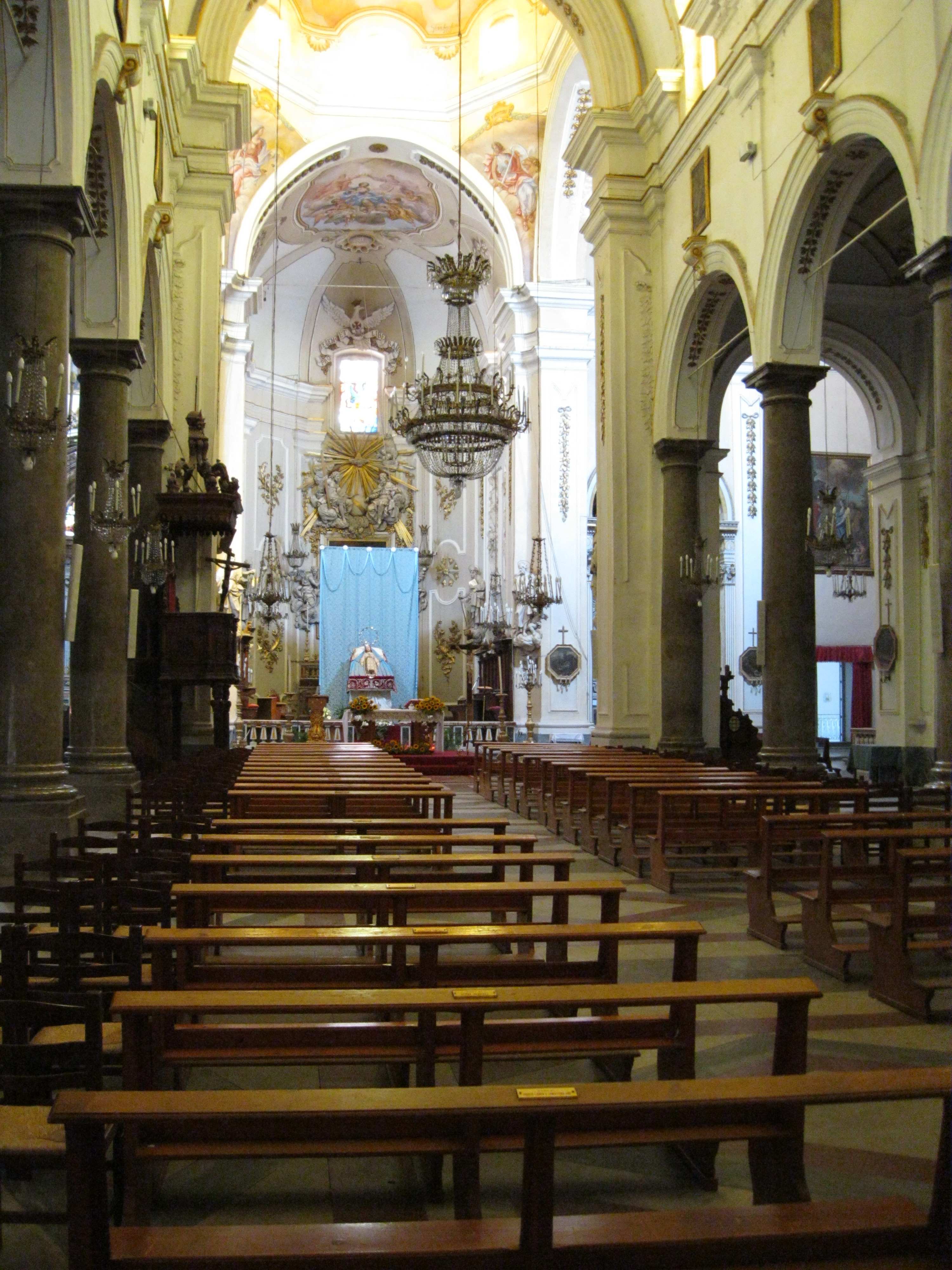 La chiesa parrocchiale della Santissima Annunziata a Caccamo, nella città metropolitana di Palermo.